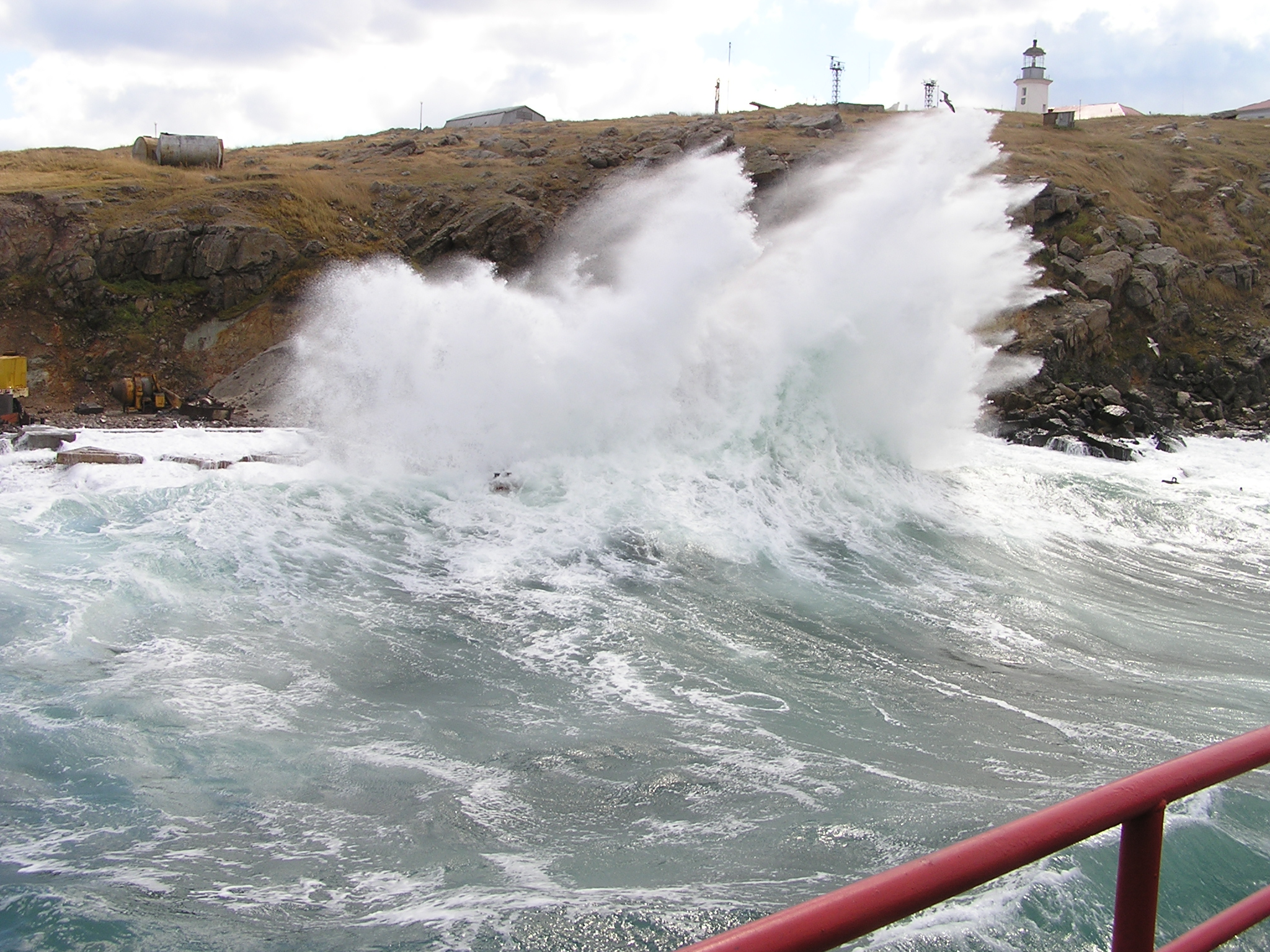 Snake Island